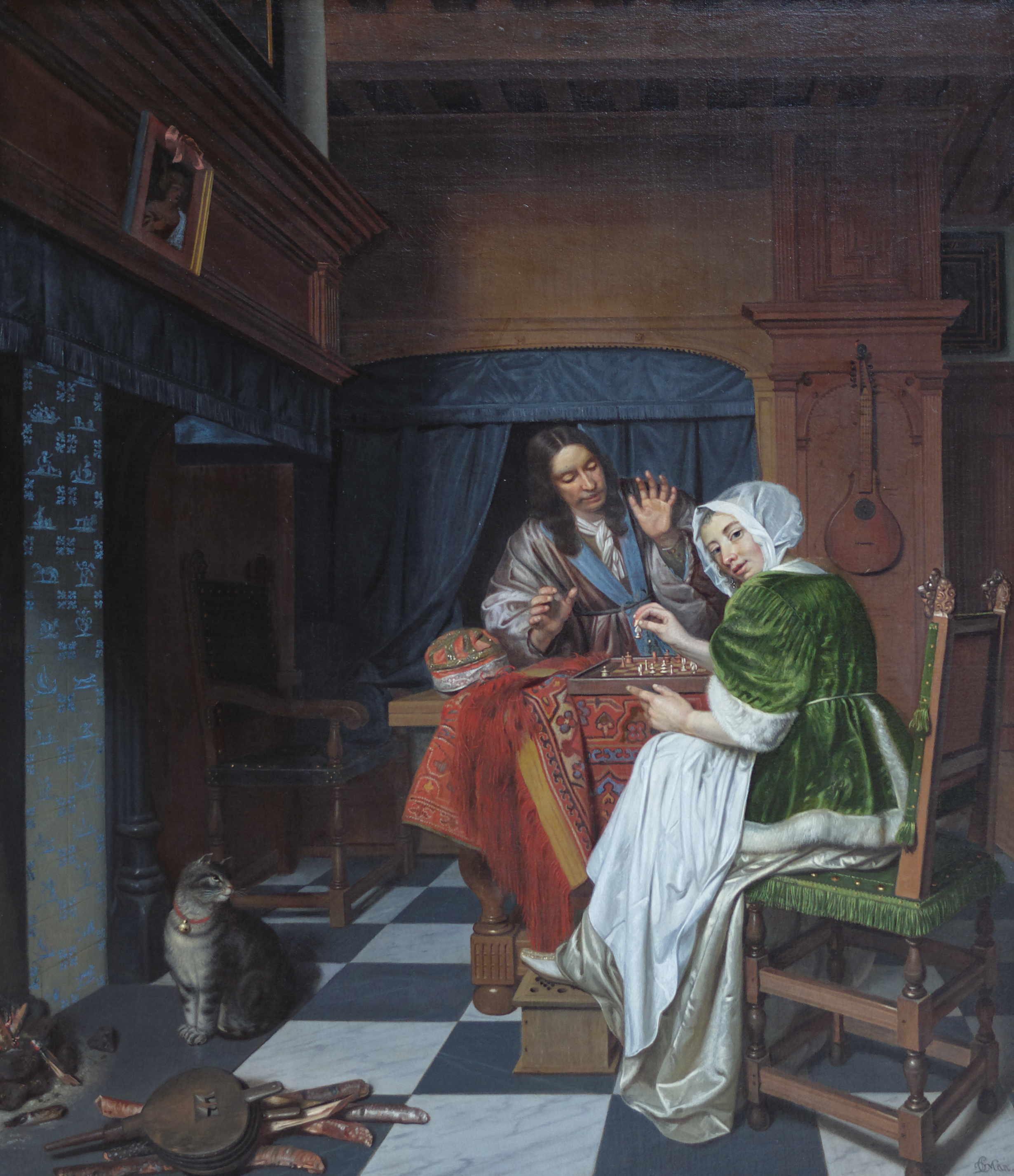 The Chess Playerslabel QS:Lde,"die Schachspieler"label QS:Len,"The Chess Players"label QS:Lfr,"Les joueurs d'échec"